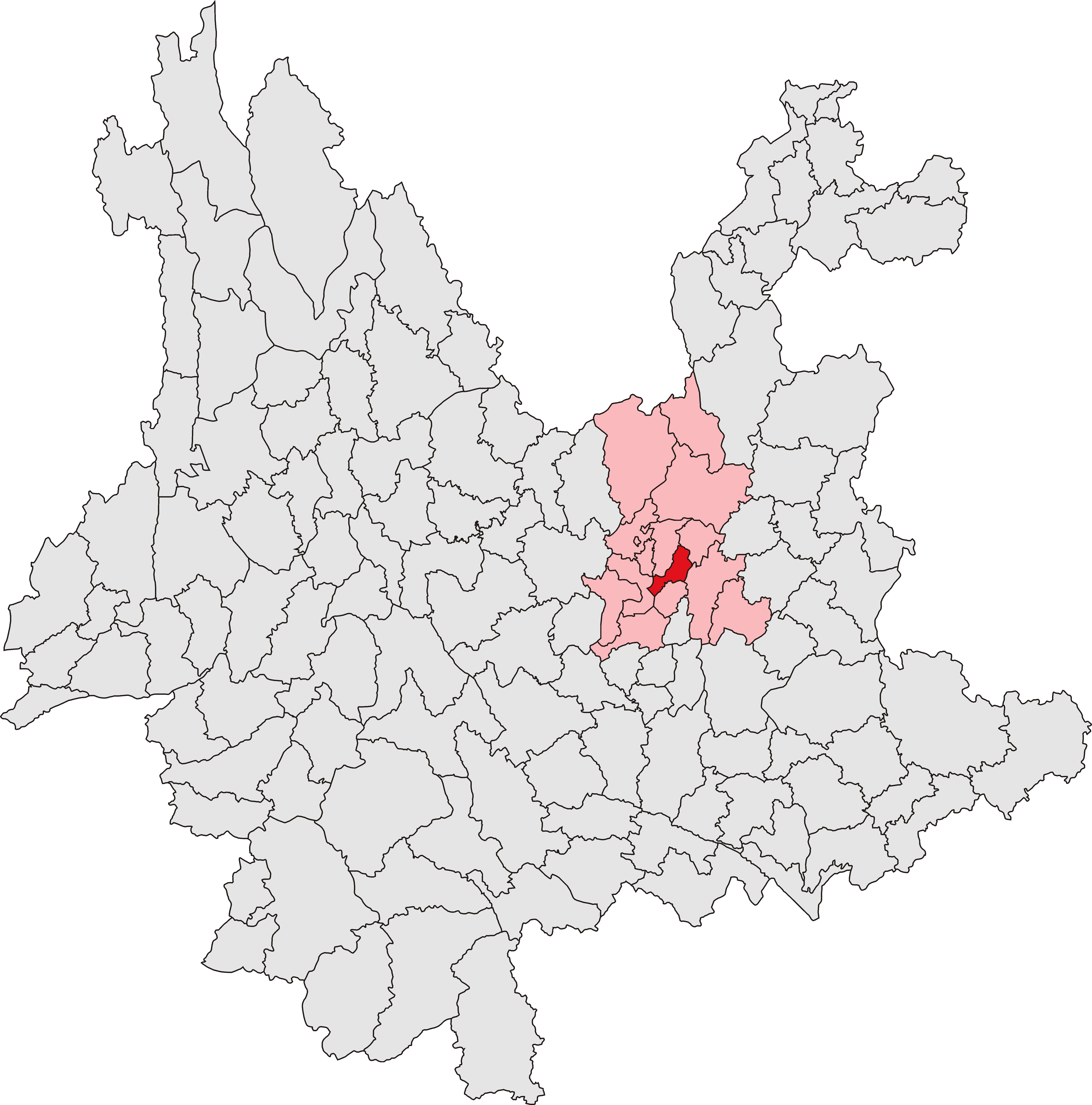 中文（中国大陆）: 官渡区位置图